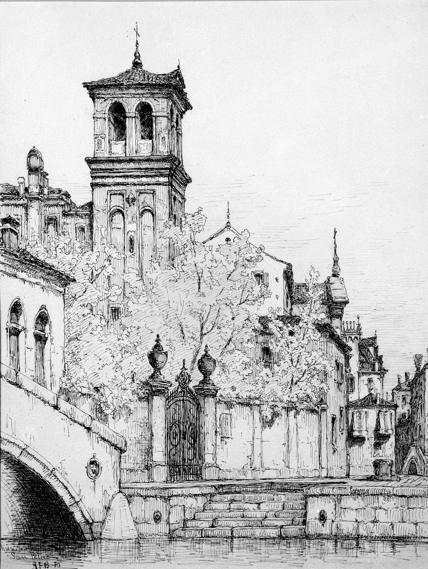 Drawing; Drawings